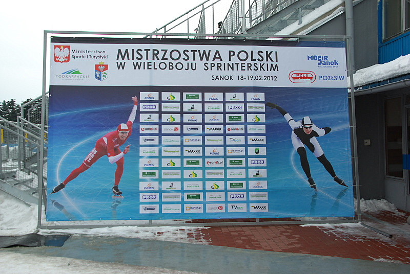 MP w wielobojach sprinterskich Sanok 2012